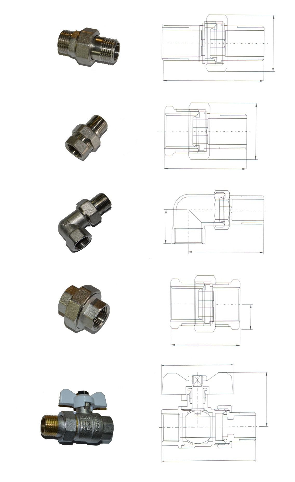 Разъёмное соединение труб.